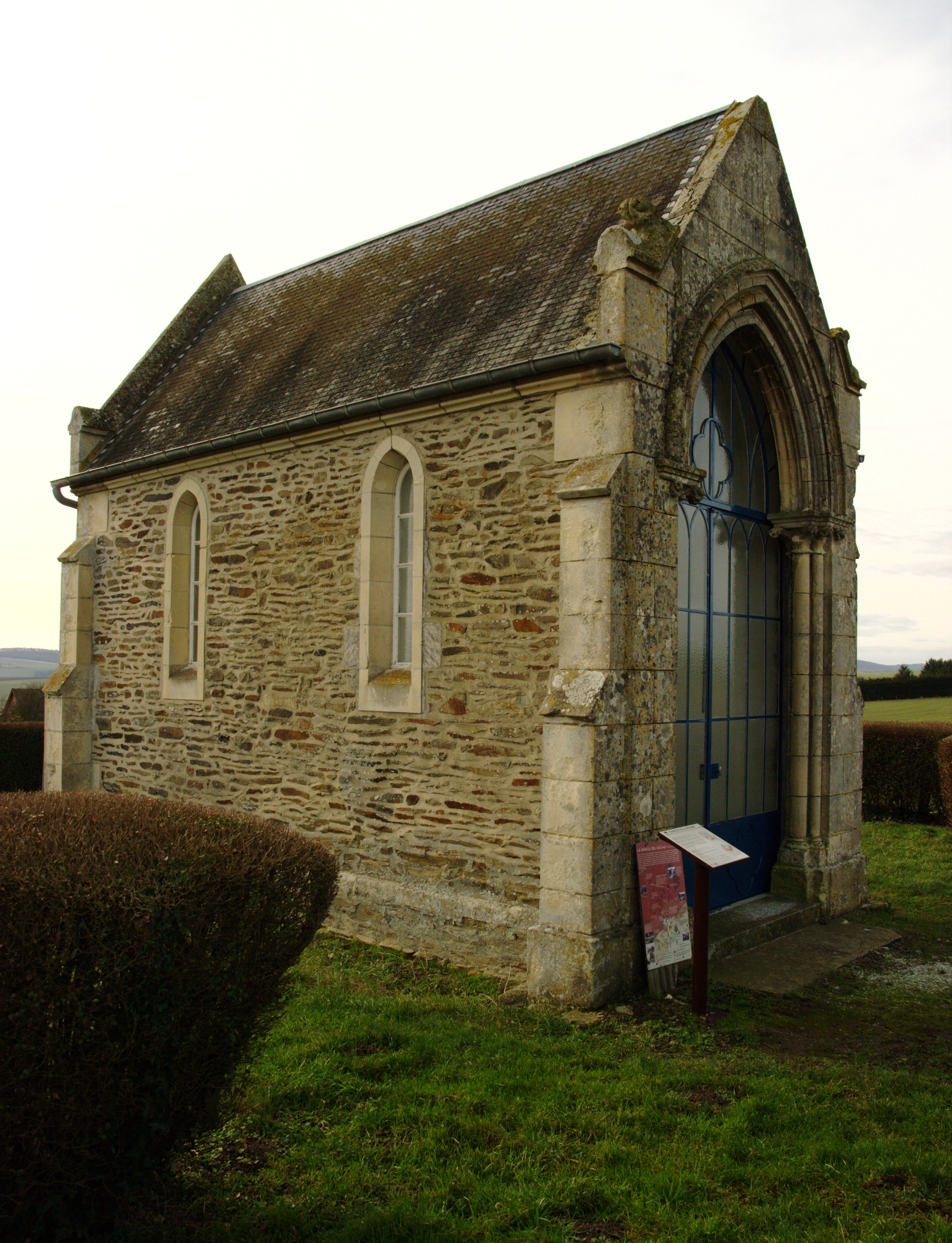 La chapelle Notre-Dame, édifiée en 1870 dite "Chapelle de la Métairie", sur la commune de Curcy-sur-Orne, Calvados. Construite sur l'emplacement d'une croix de pierre "croix de la Métairie" aujourd'hui disparue.